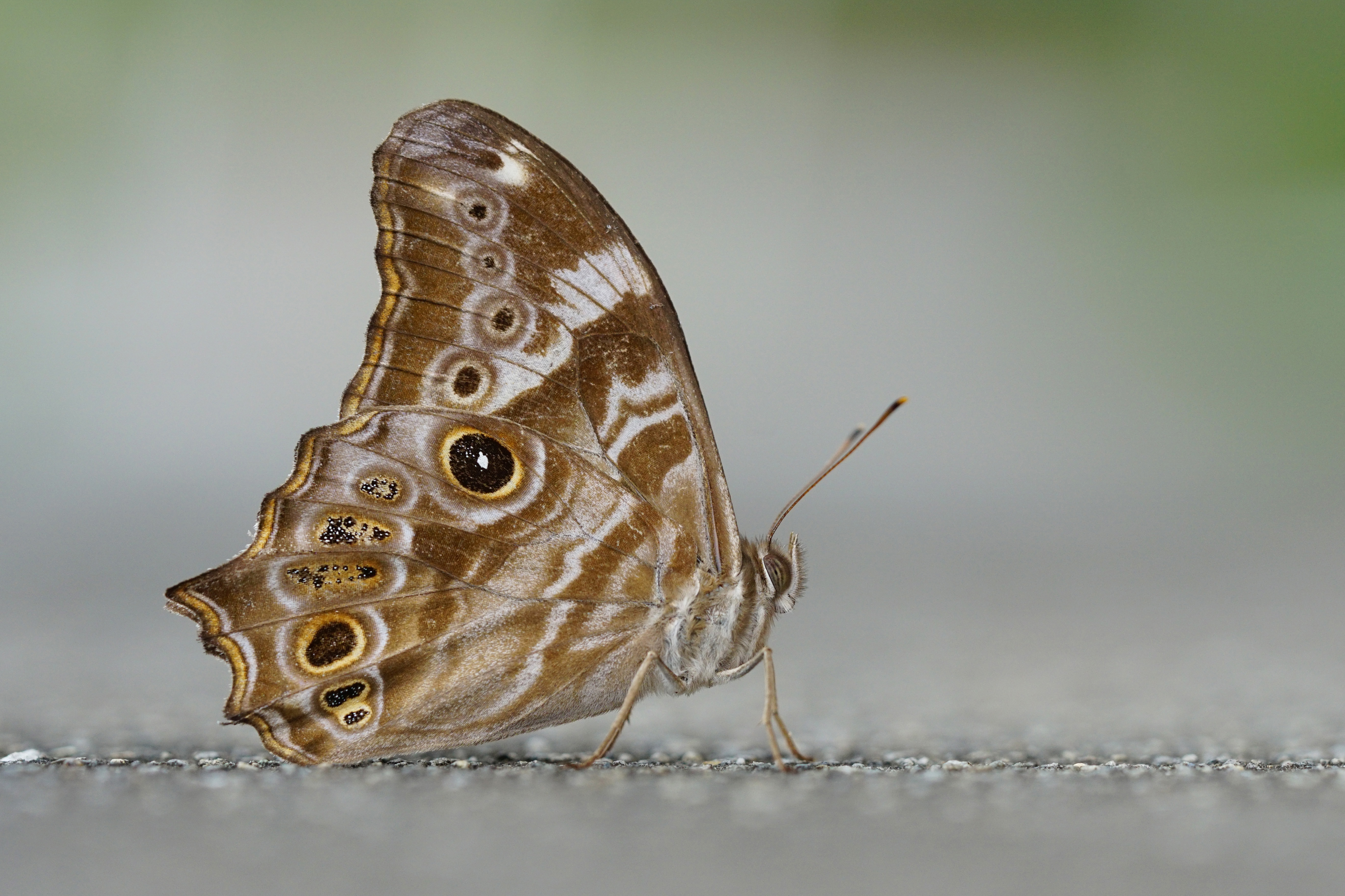 波紋黛眼蝶 Lethe rohria daemoniaca